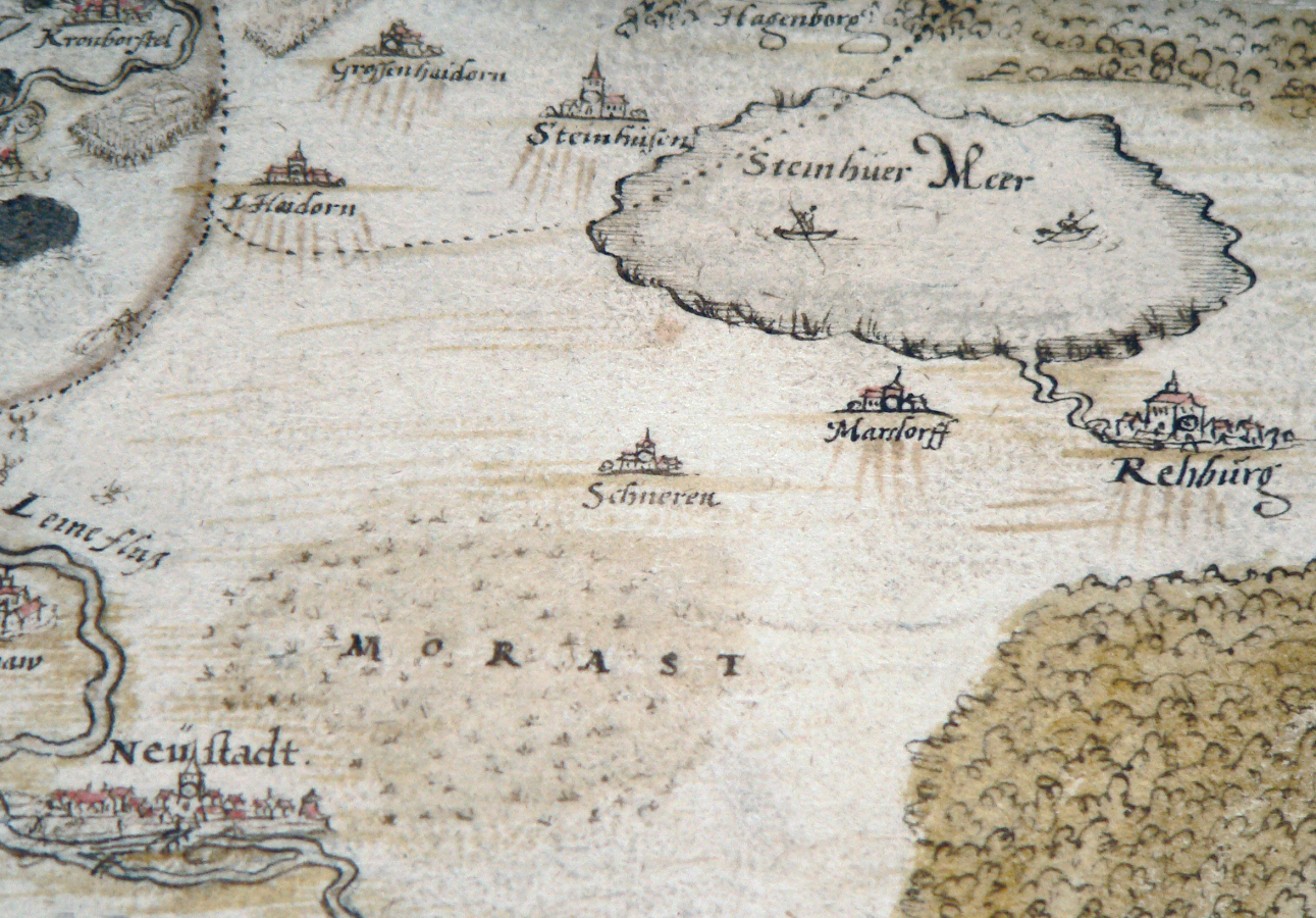 Steinhuder Meer und Totes Moor als Morast in Stiftsfehde, Norden ist auf der Unterseite des Bildes